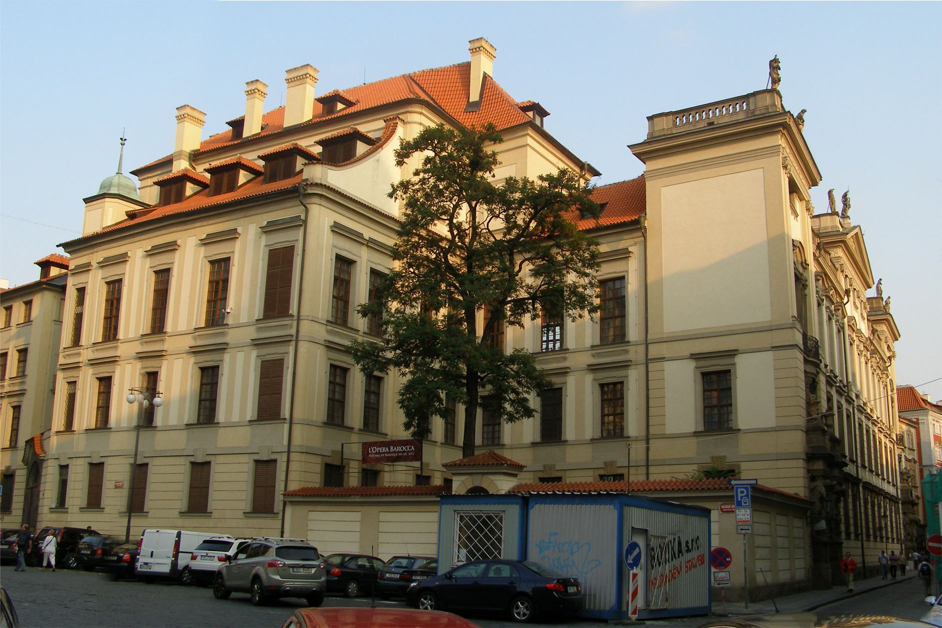 Palác Clam - Gallasův, Praha 1, Husova 158/20, Staré Město